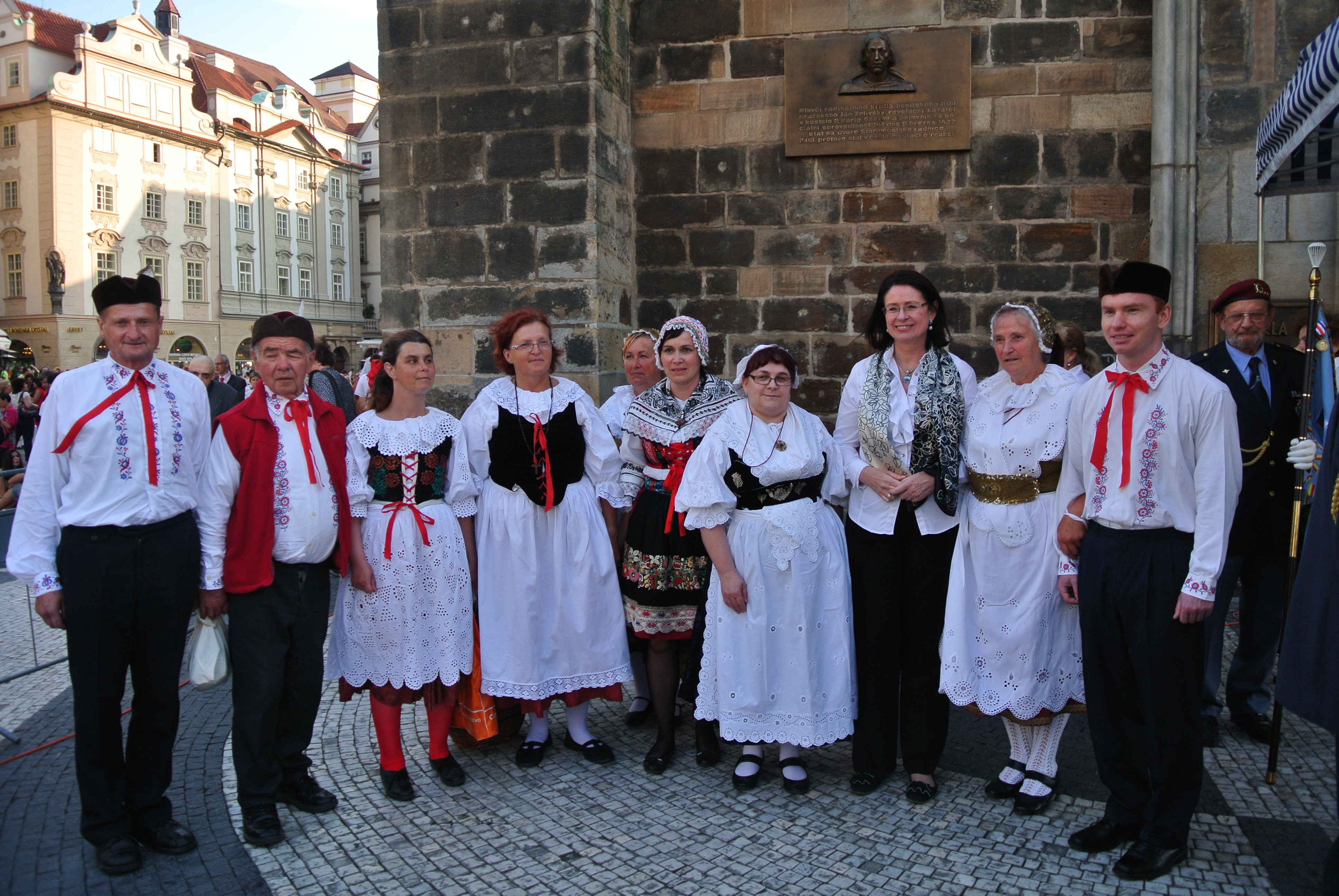 Poprava 27 českých pánů v Praze na Staroměstském náměstí 21.6.2012